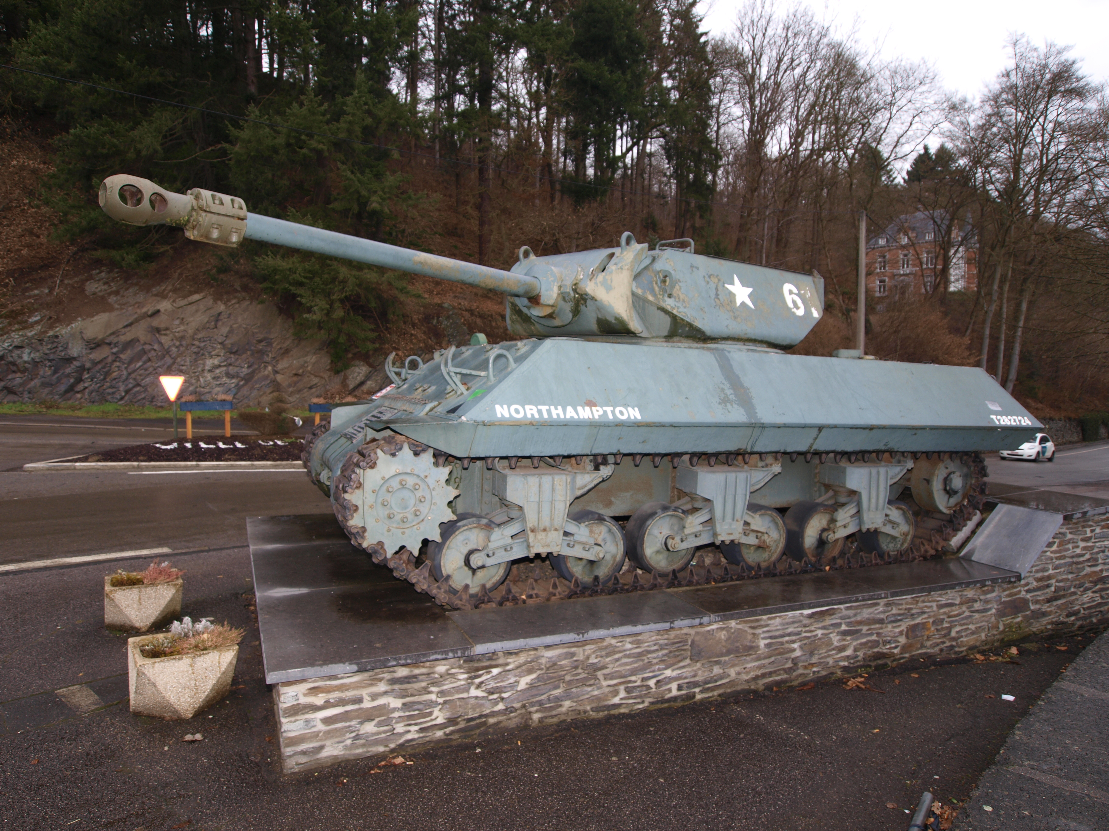 Achilles Tank Destroyer Mk10 at La Roche-en-Ardenne, Belgium